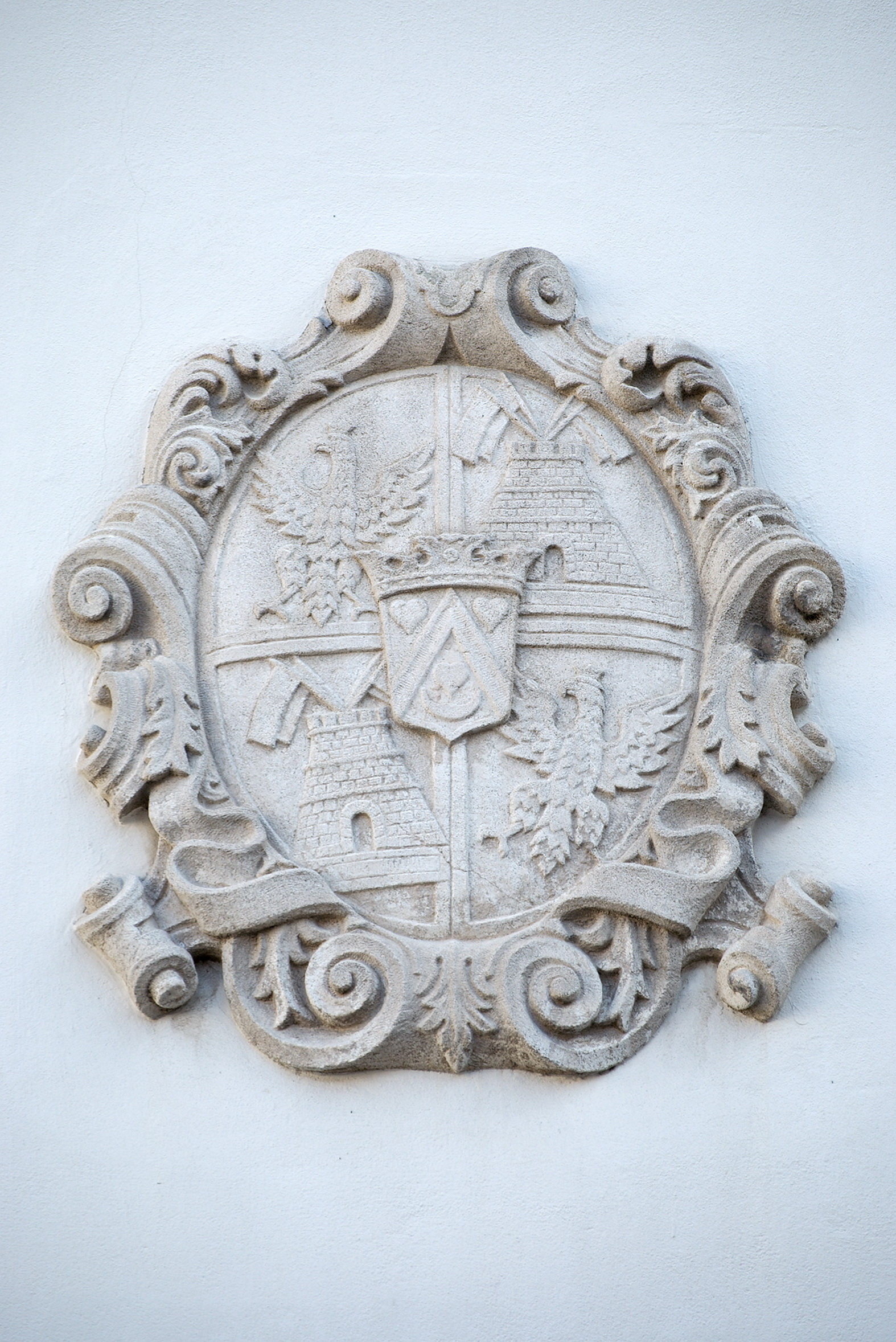 Erb Louise Raduita de Souche na druhém nádvoří brněnského hradu Špilberku